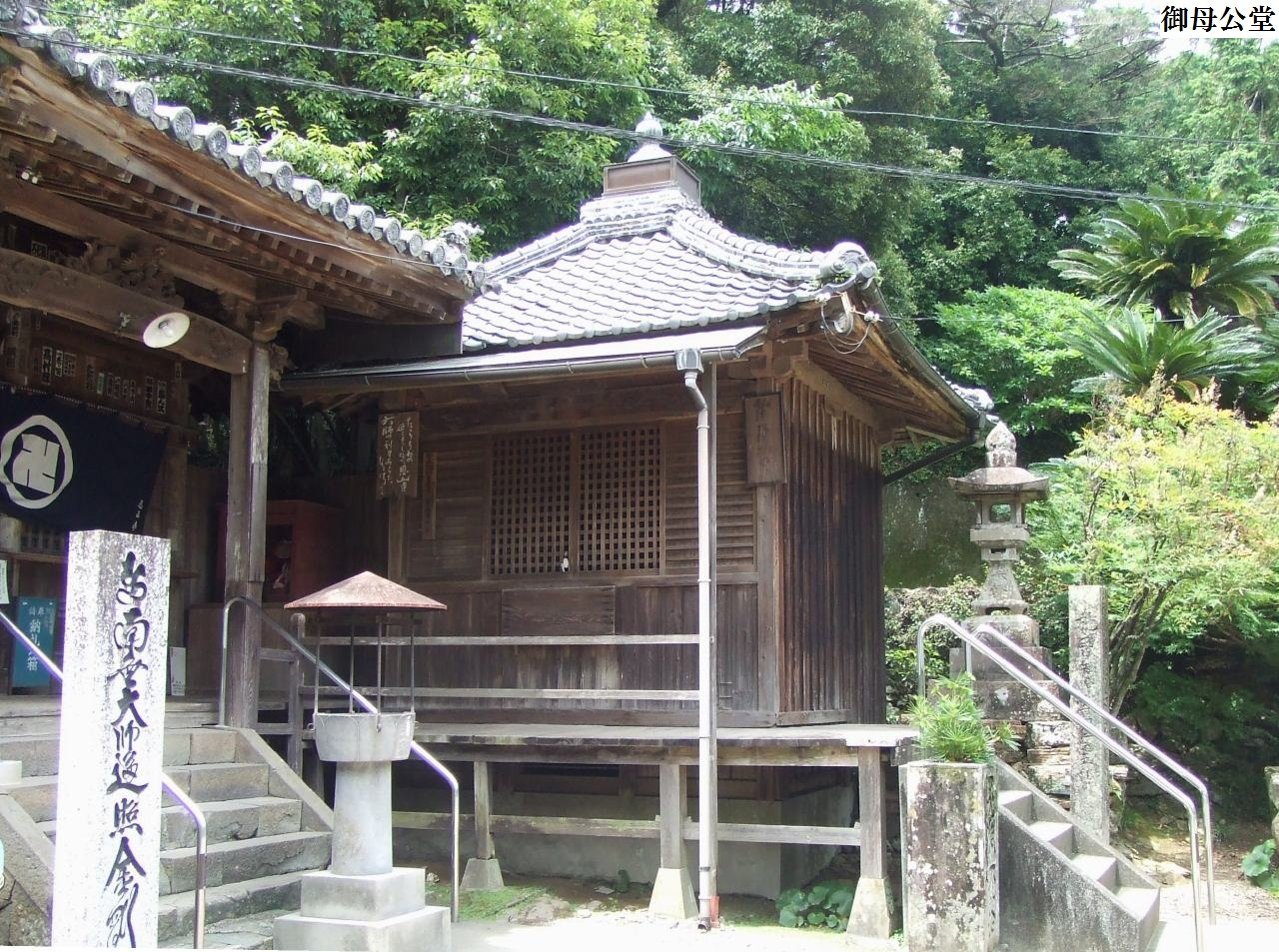 恩山寺の母公堂